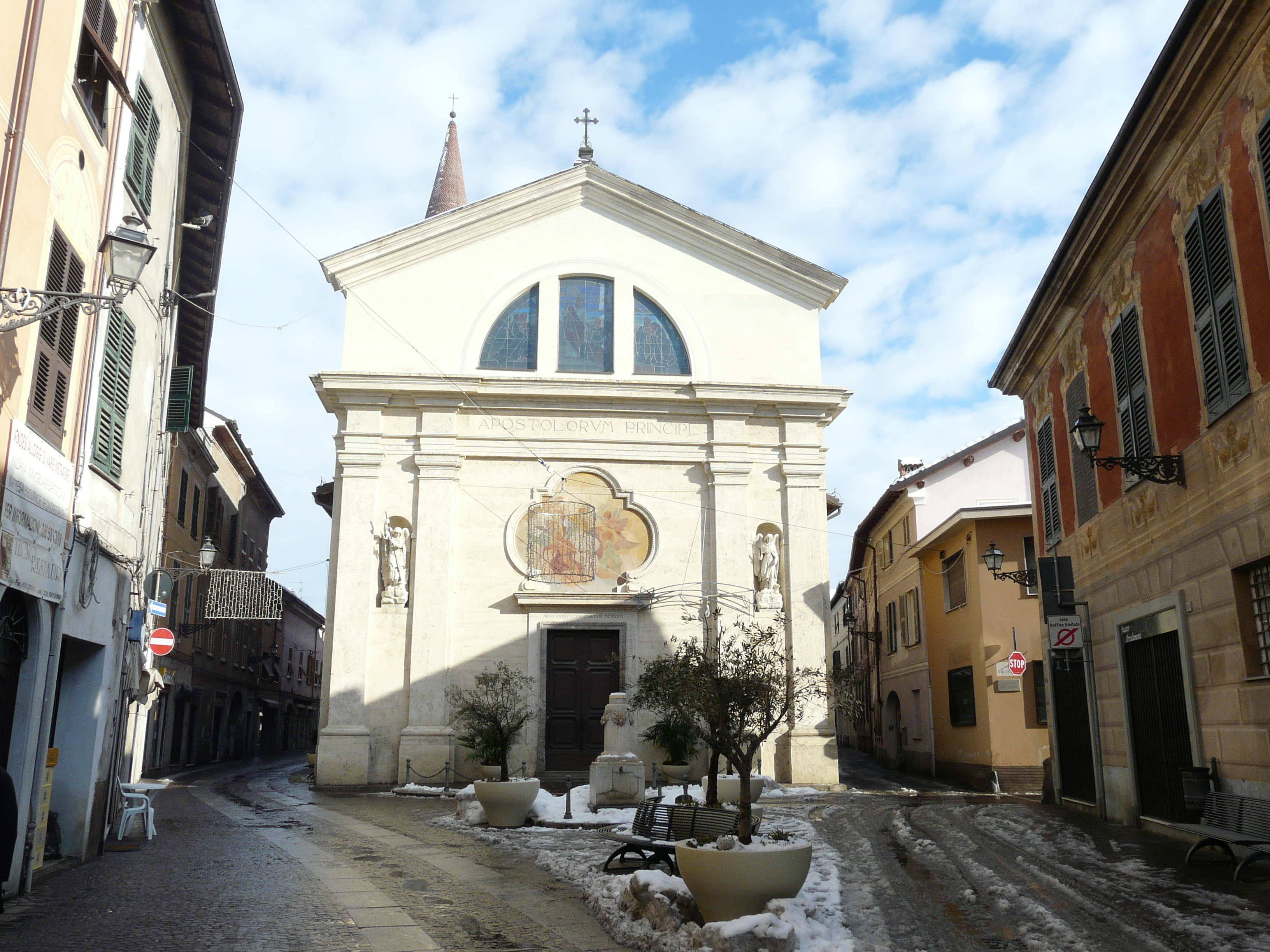 Chiesa di San Pietro, Novi Ligure, Piemonte, Italia